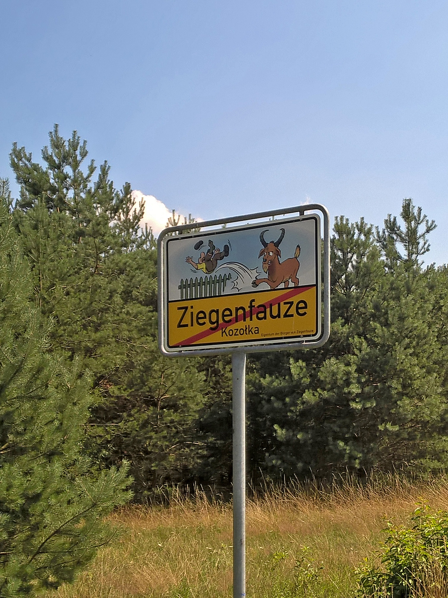 Ortsausgangsschild von Neulömischau "Ziegenfauze"